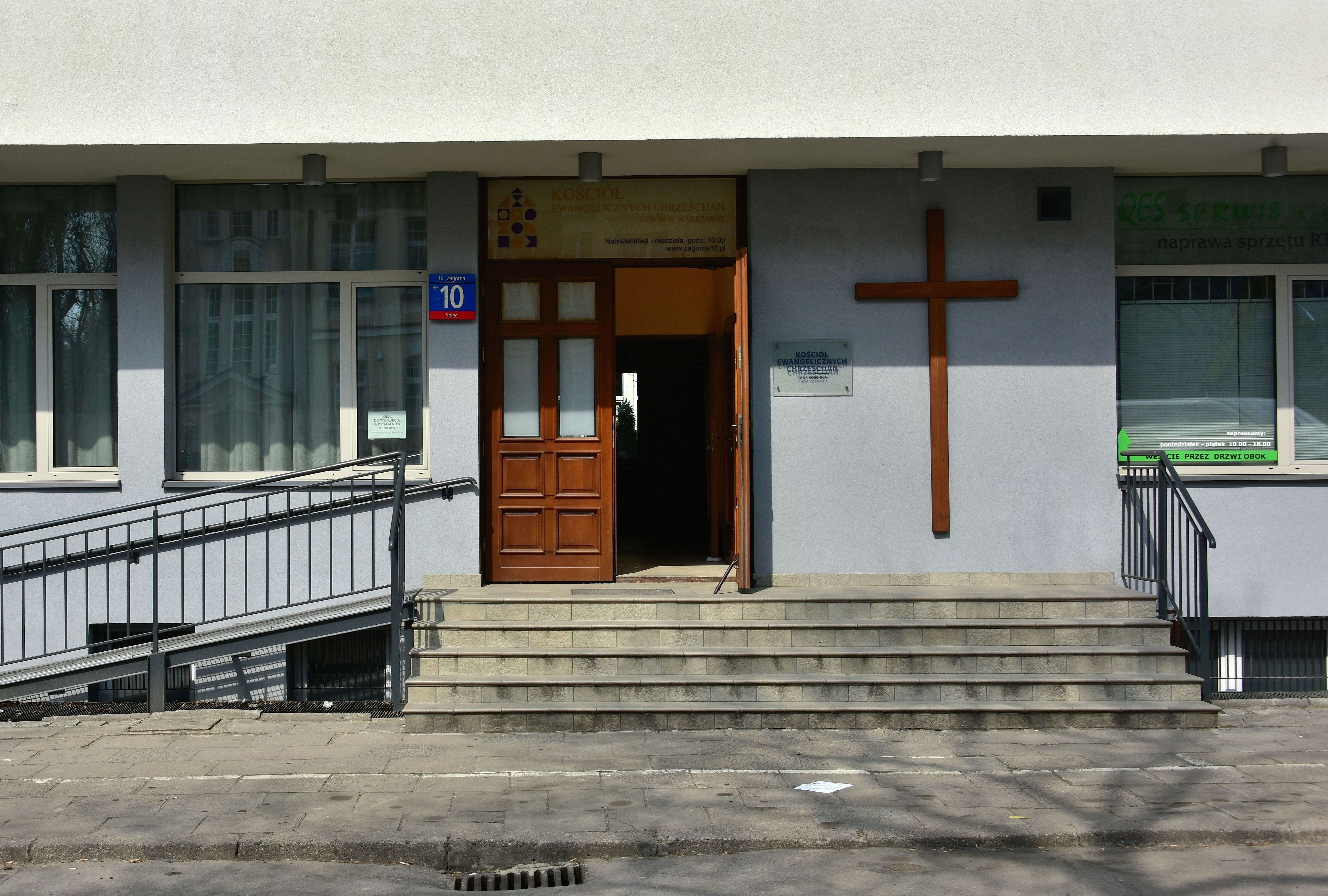 Kościół Ewangelicznych Chrześcijan I Zbór w Warszawie ul. Zagórna 10